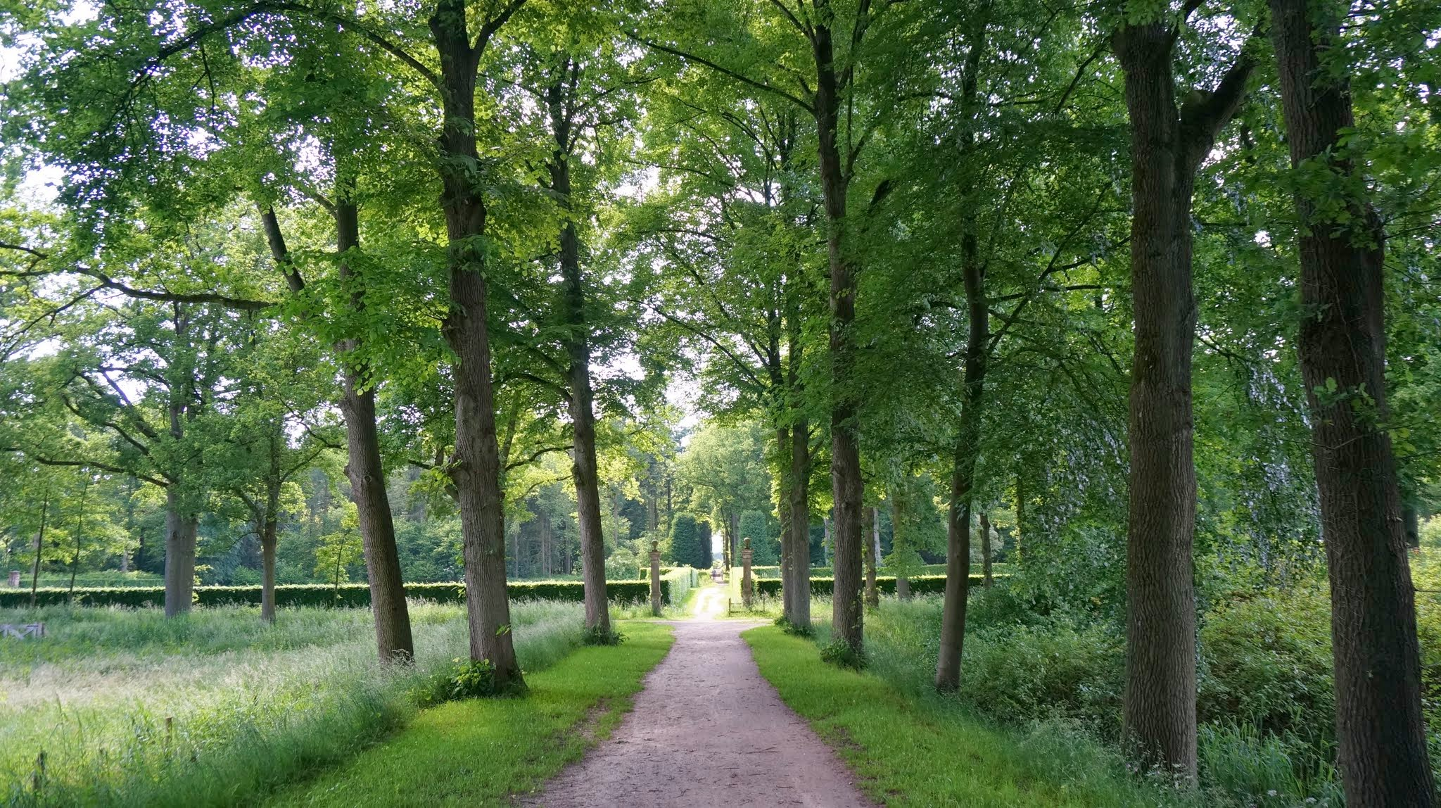 7041 's-Heerenberg, Netherlands